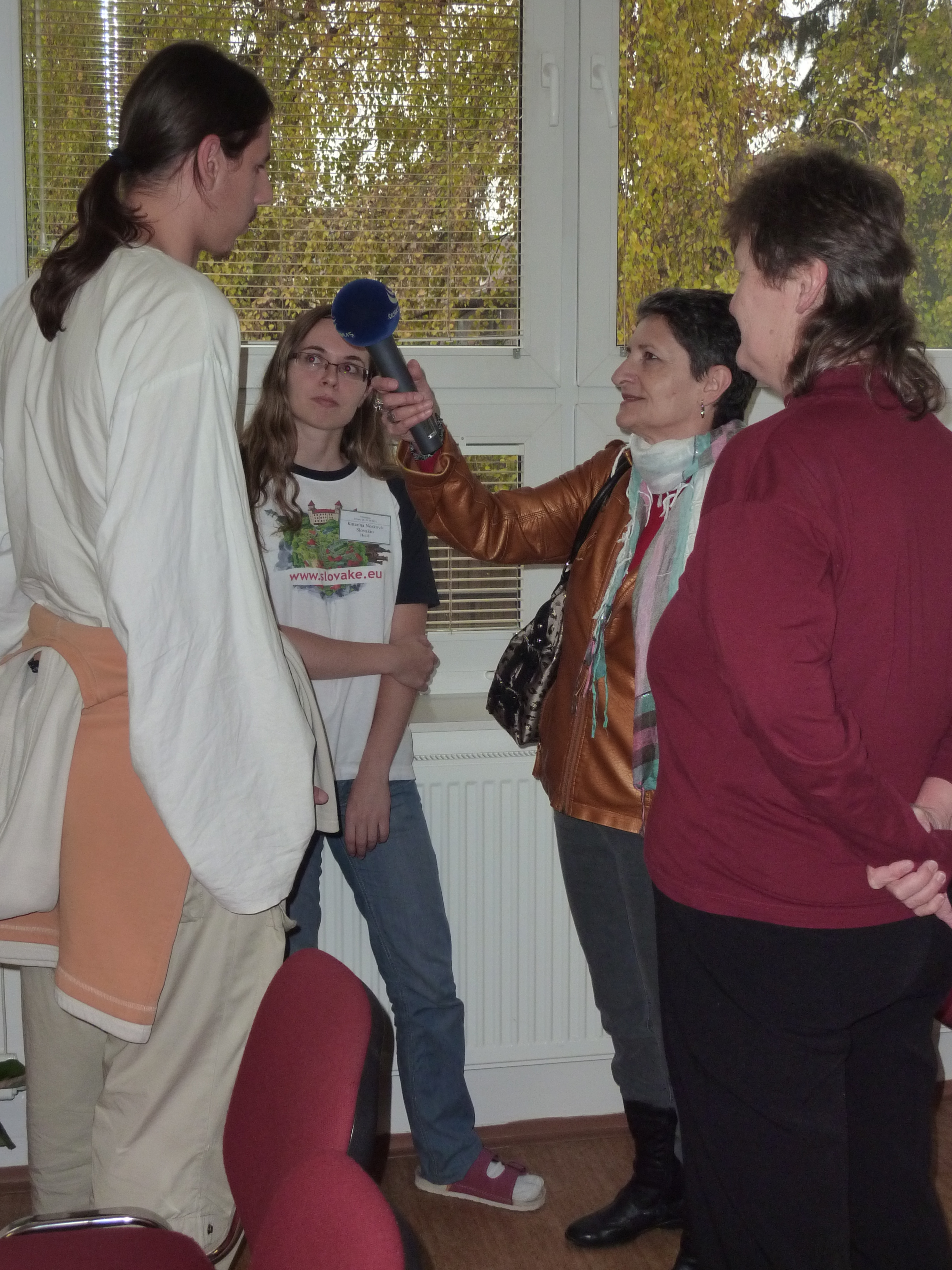 Intervjuo de Michal Matúšov, Katarína Nosková kaj Magdaléna Feifičová por la Ĉeĥa radio dum Esperanta Vikimanio 2011 en Svitavy.